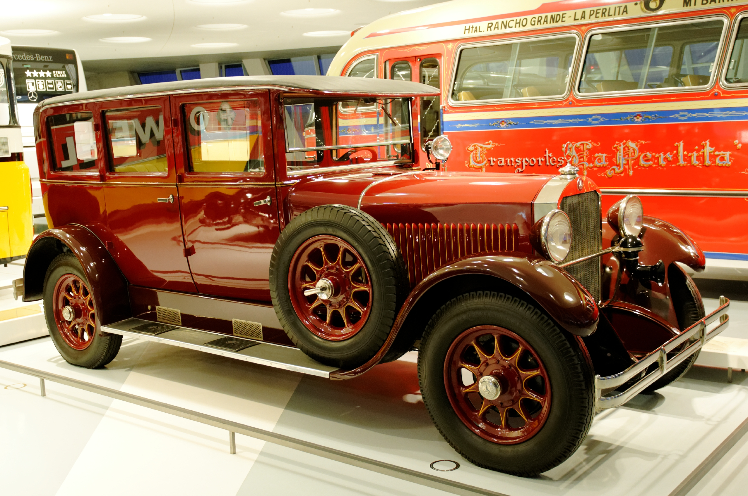 Bilder aus dem Mercedes-Benz-Museum 2015